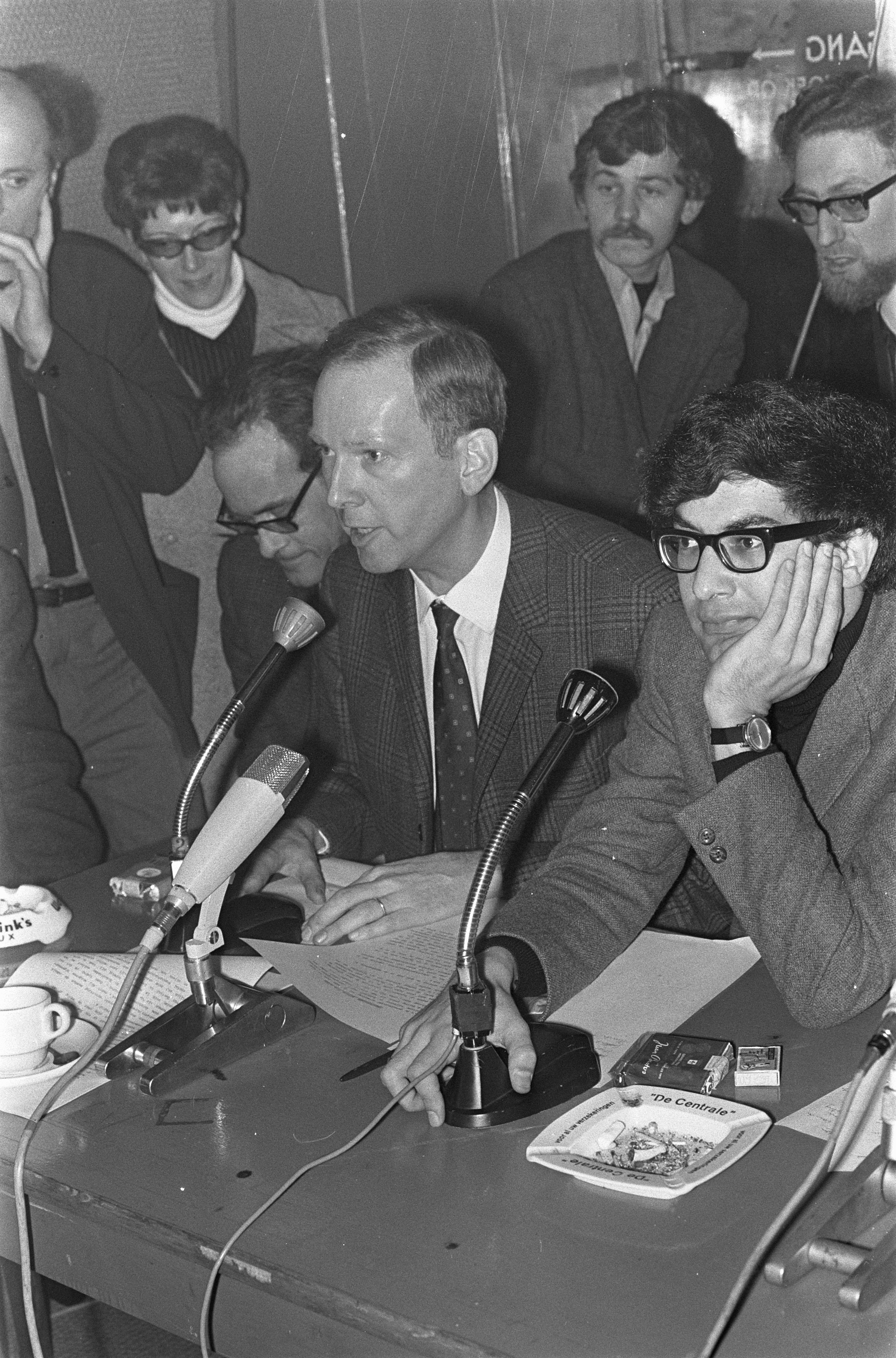 Collectie / Archief : Fotocollectie Anefo Reportage / Serie : [ onbekend ] Beschrijving : Dr. J.E. Hueting sprak in cafe Pieterspoort over oorlogsmisdaden in Indonesie Hueting en van Tijn (r), nr. 7 : vlnr Hueting, Tijn, Sluimers, Haas, Datum : 22 januari 1969 Locatie : Indonesië Trefwoorden : OORLOGSMISDADEN, cafes Persoonsnaam : GOEDHART, HAAS, HUETING Fotograaf : Evers, Joost / Anefo Auteursrechthebbende : Nationaal Archief Materiaalsoort : Negatief (zwart/wit) Nummer archiefinventaris : bekijk toegang 2.24.01.05 Bestanddeelnummer : 922-0307